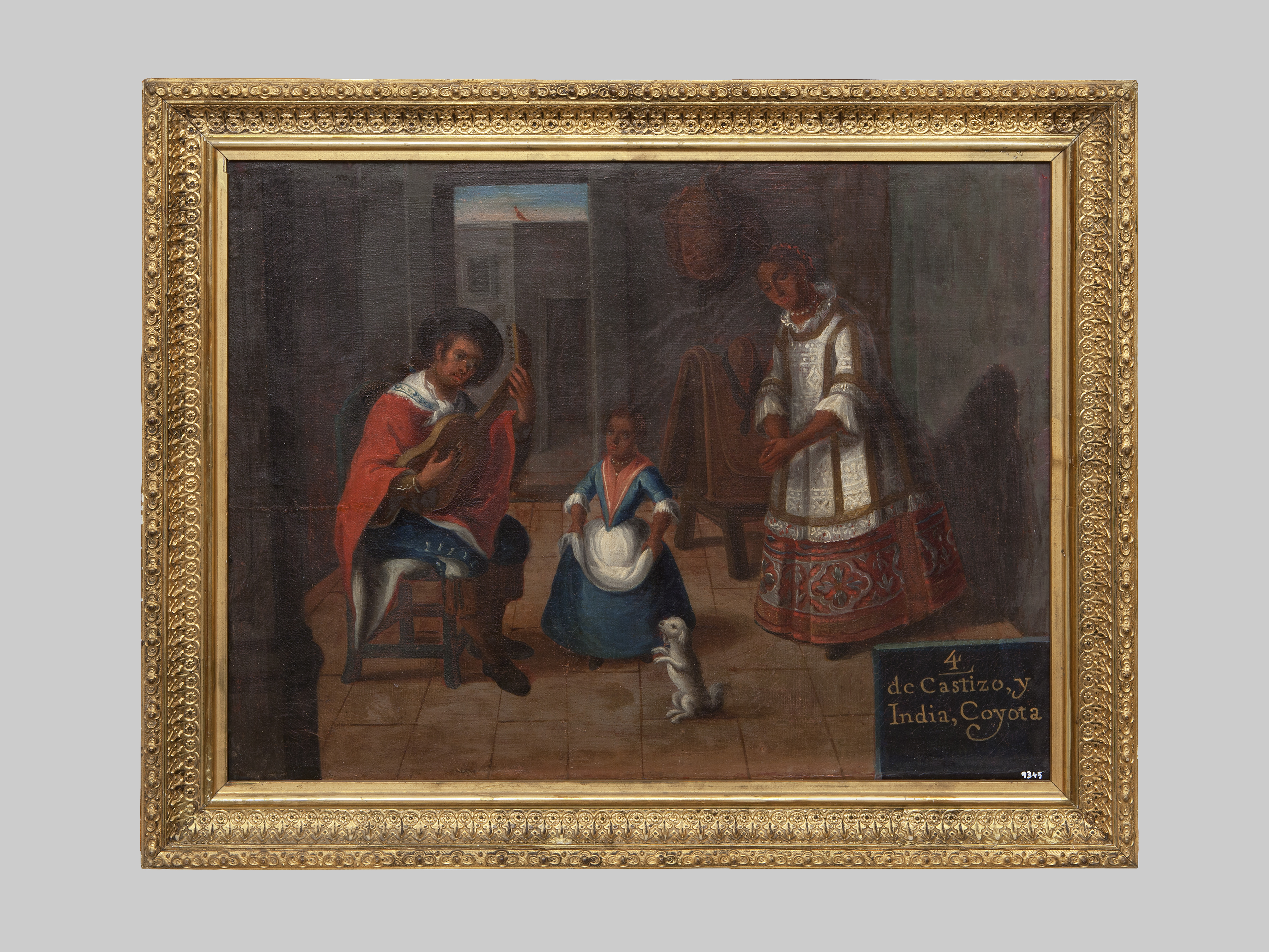 "4. De Castizo y India, Coyota". pintura sobre tela. Biblioteca Museu Víctor Balaguer